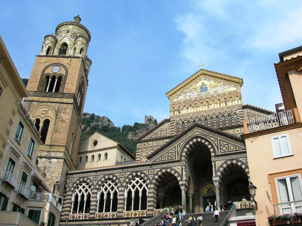 L'esterno